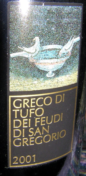 Bottle Greco di Tufo